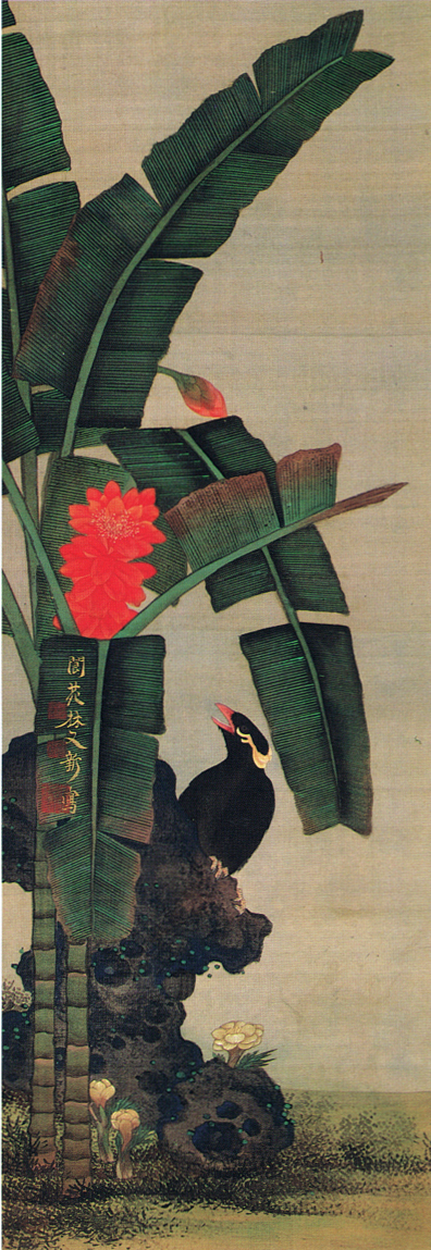 林閬苑筆 芭蕉九官鳥図